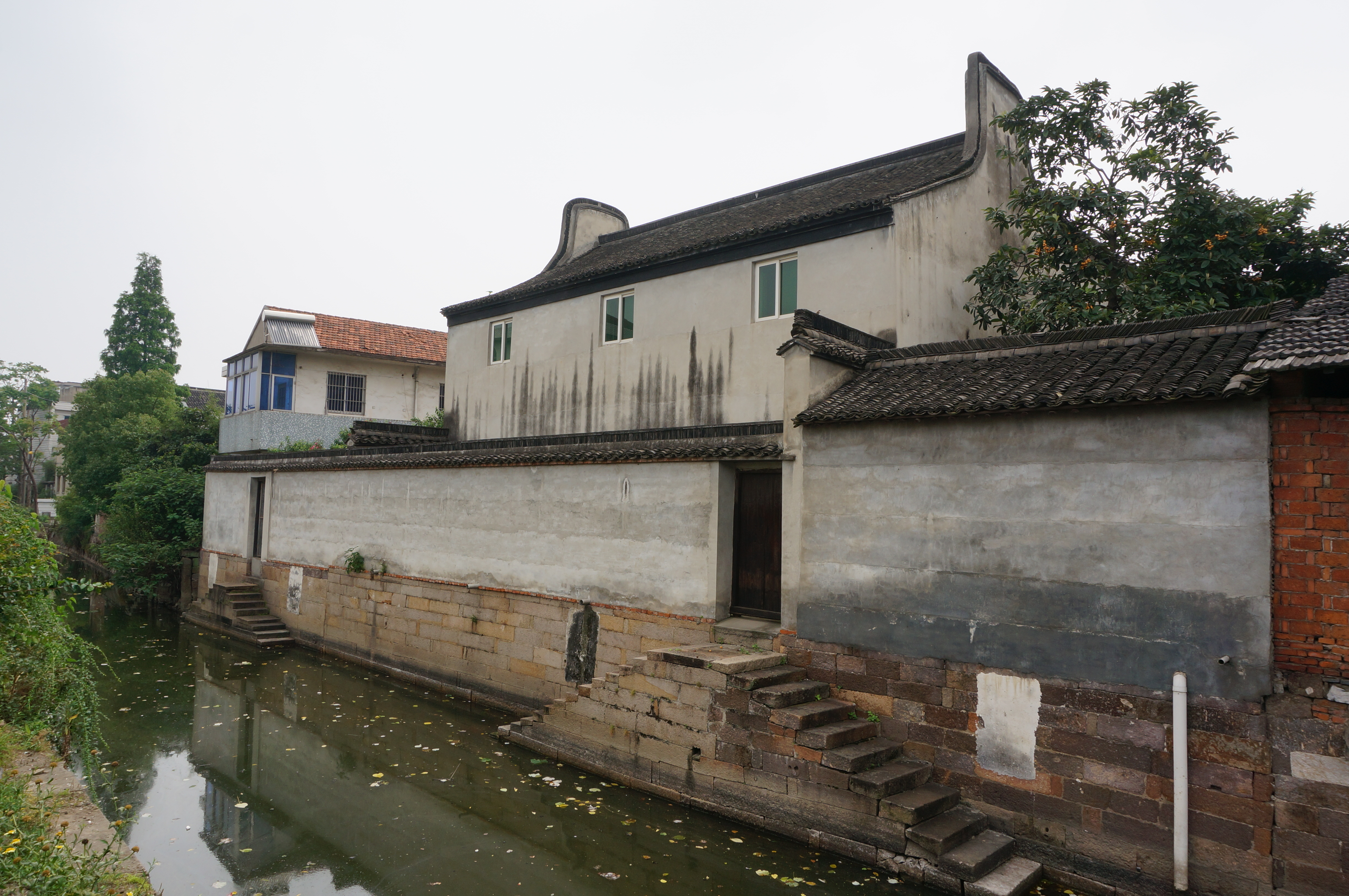 大有桥街章宅，西南侧。